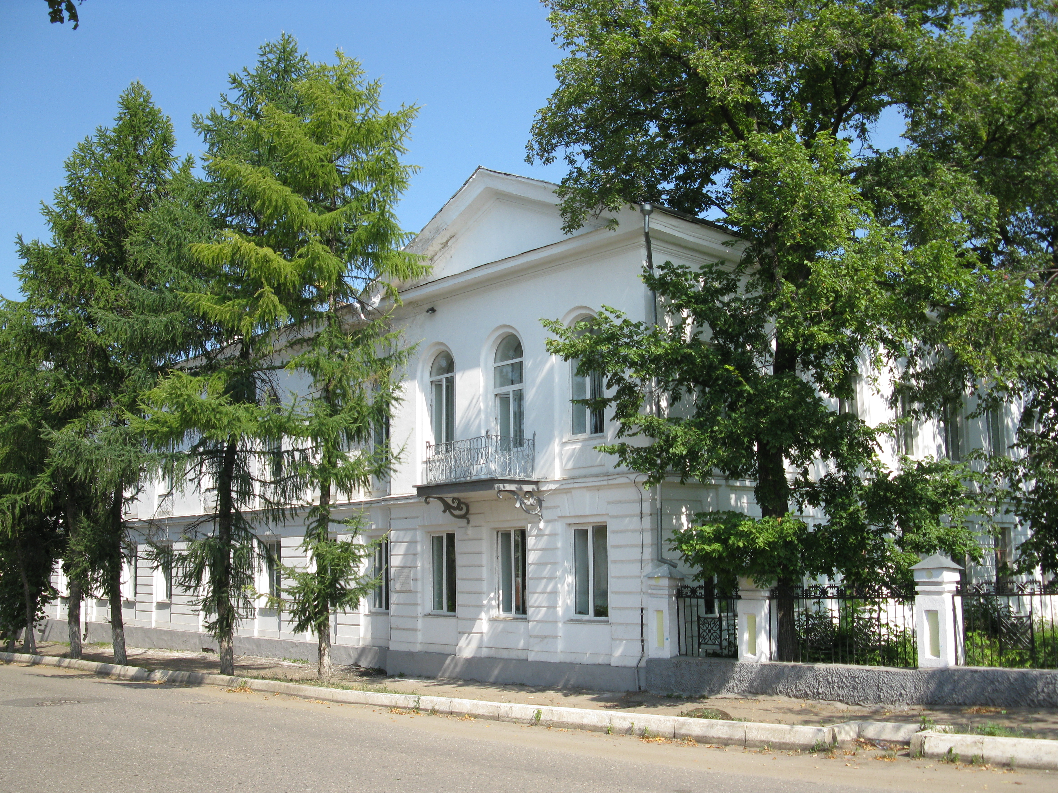 Первоначально - здание земской управы